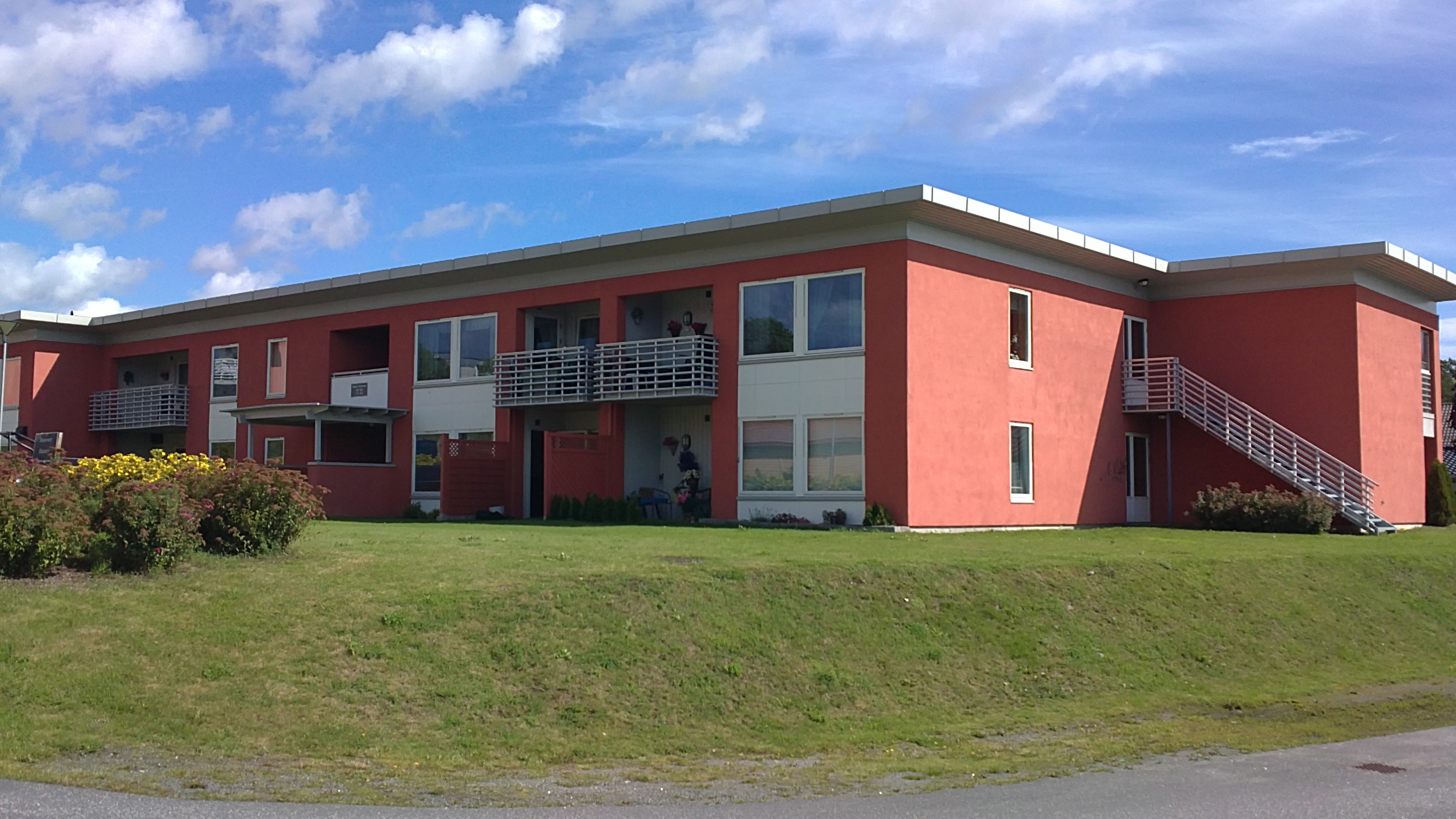 Bilde fra Frøytunet borettslag, Nanset